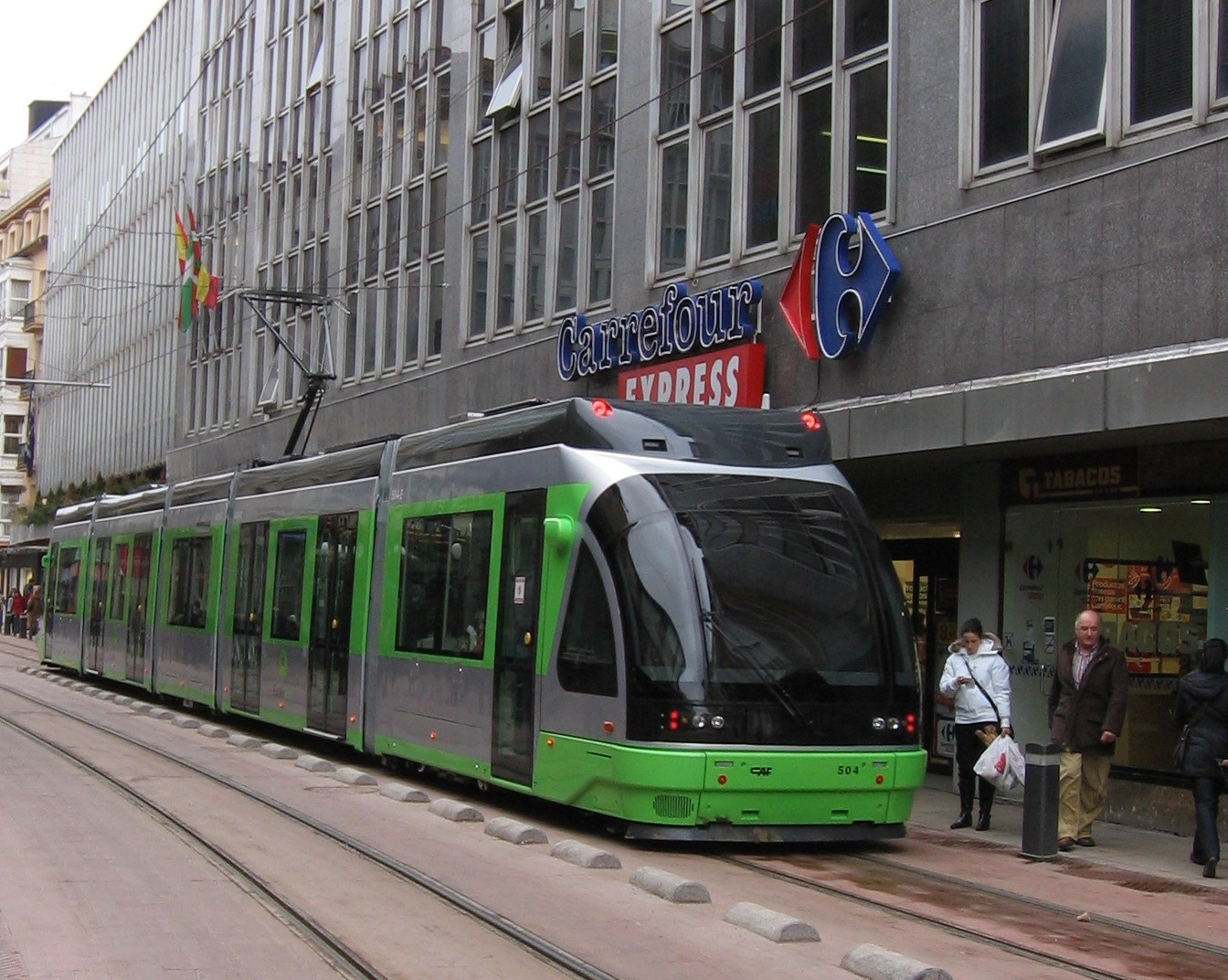 Tranvía de Vitoria-Gasteiz